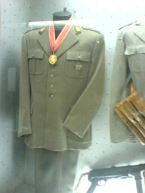 Униформа, Орден народног хероја и Партизанска споменица 1941. генерал-пуковника Пеке Дапчевића, сликана у Војном музеју у Београду.